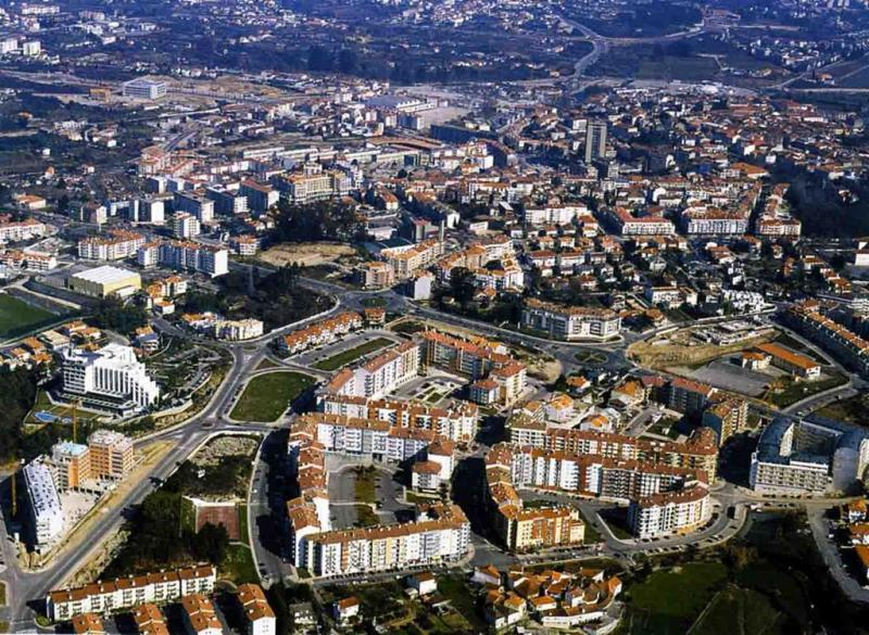 Cidade de Viseu